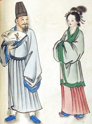 中文（香港）: 1595年的明朝人